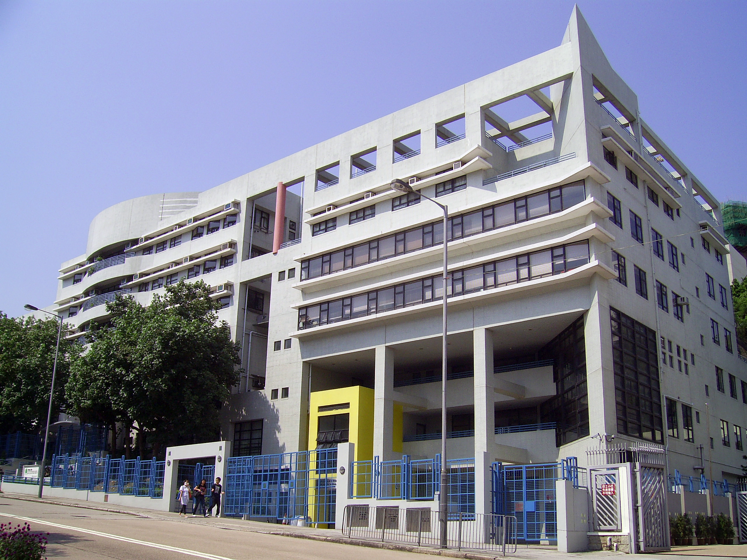 中文（香港）: 賽馬會新生精神康復學院